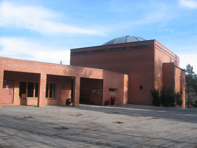 Holmlia kirke